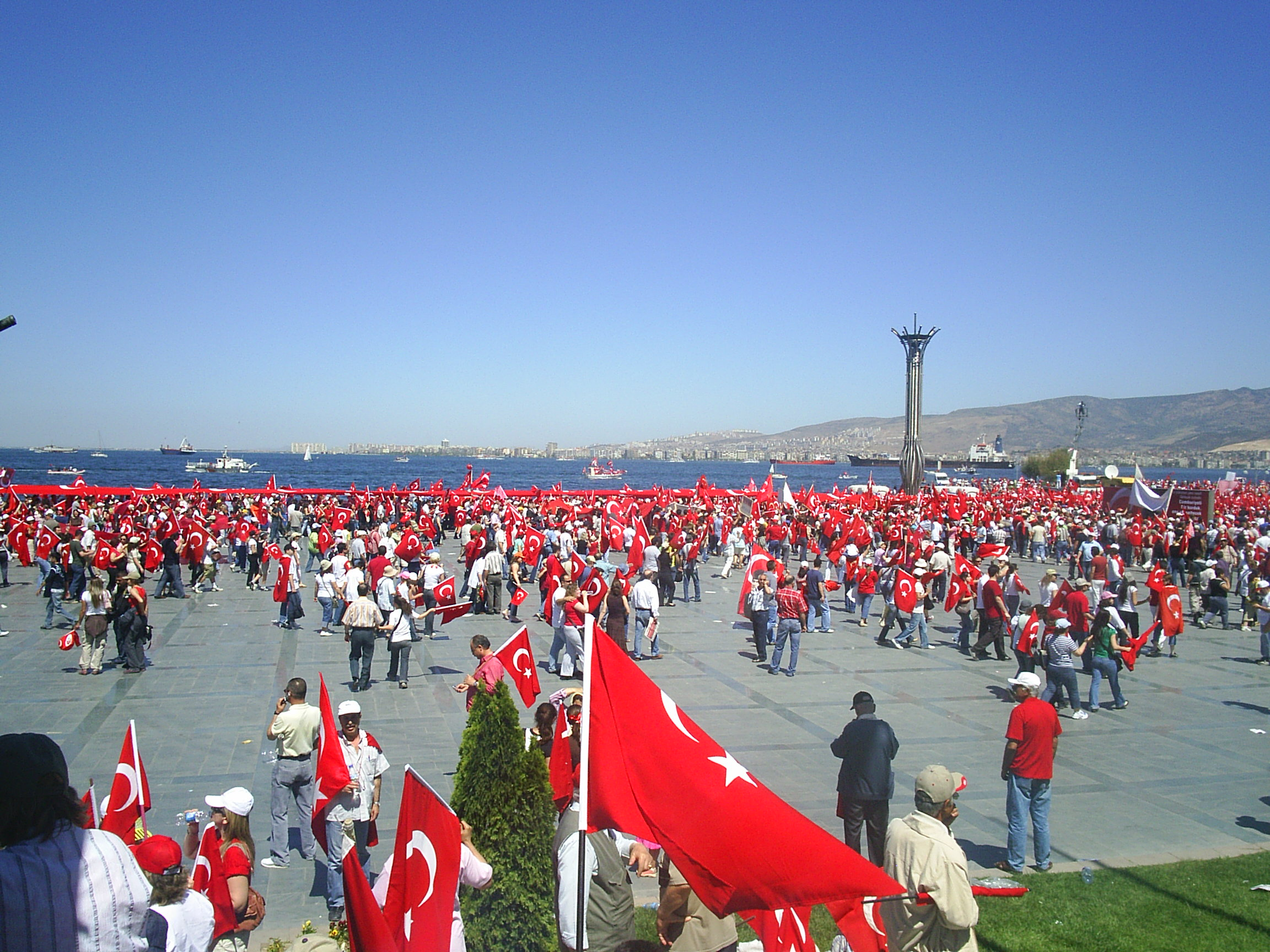 Protect Your Republic Protest, Gündoğdu square, İzmir